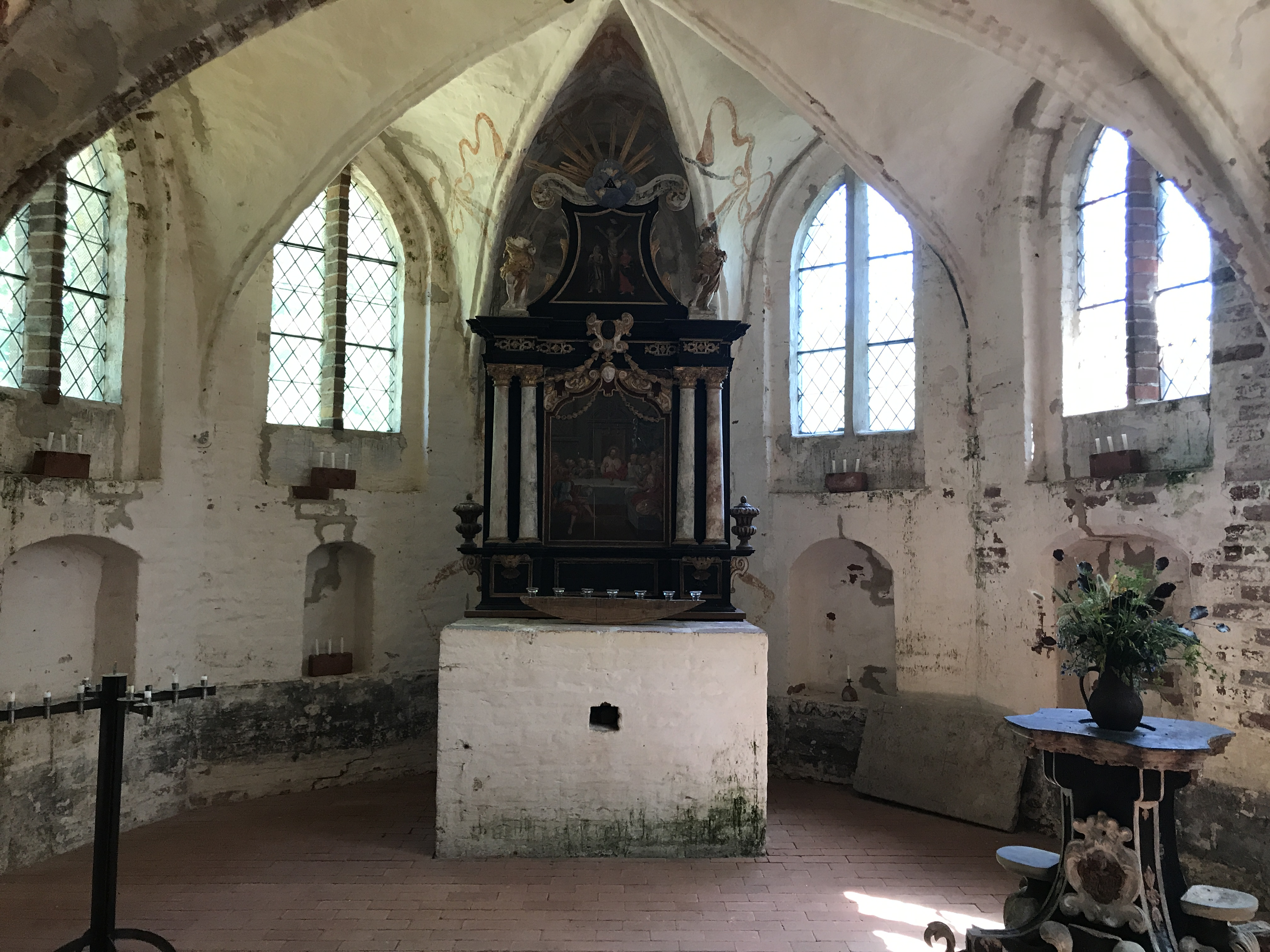 Kirche Landow der Gemeinde Dreschvitz im Landkreis Vorpommern-Rügen in Mecklenburg-Vorpommern